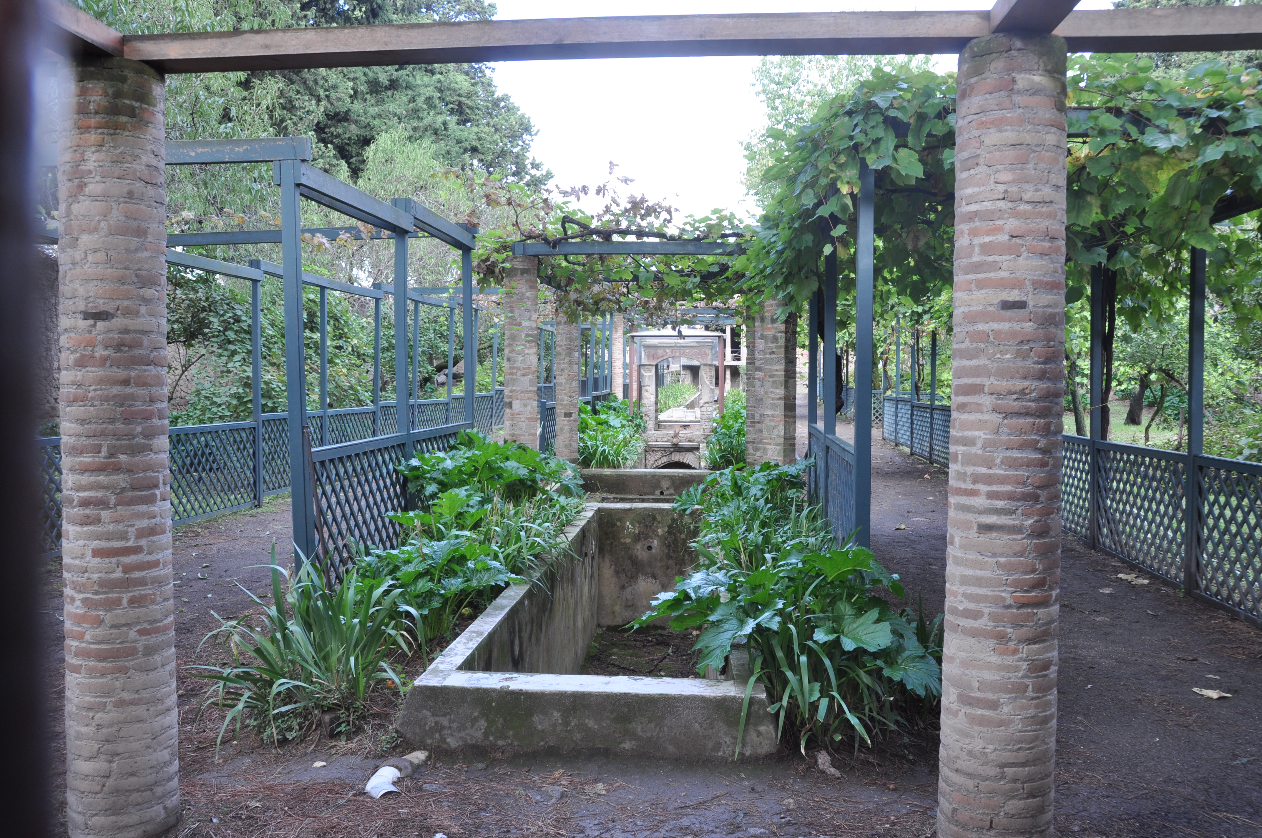 Blick in die Gartenanlage